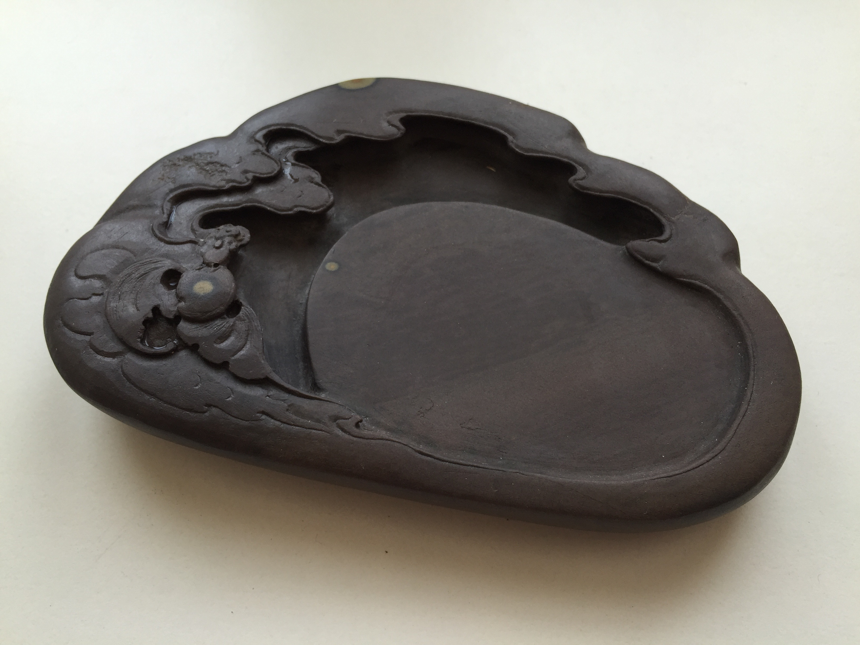 Bläcksten